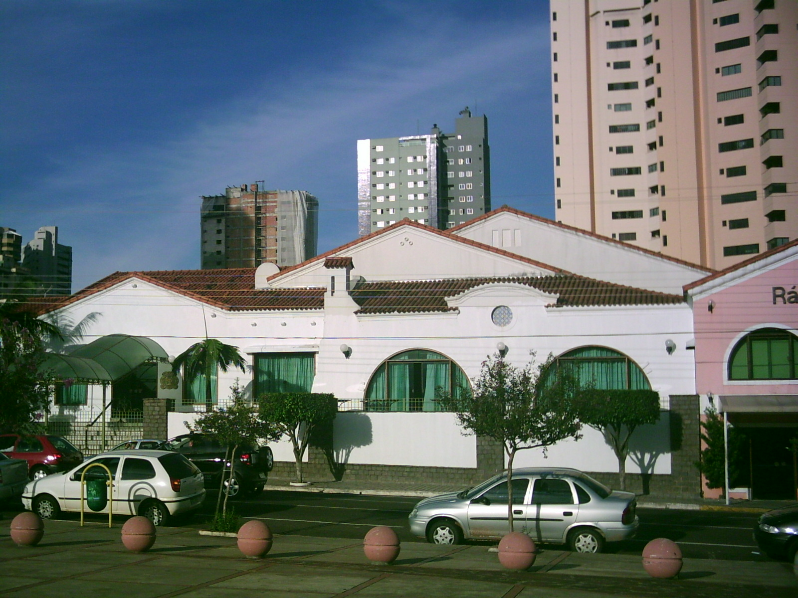 Foto do Rádio Clube - Campo Grande